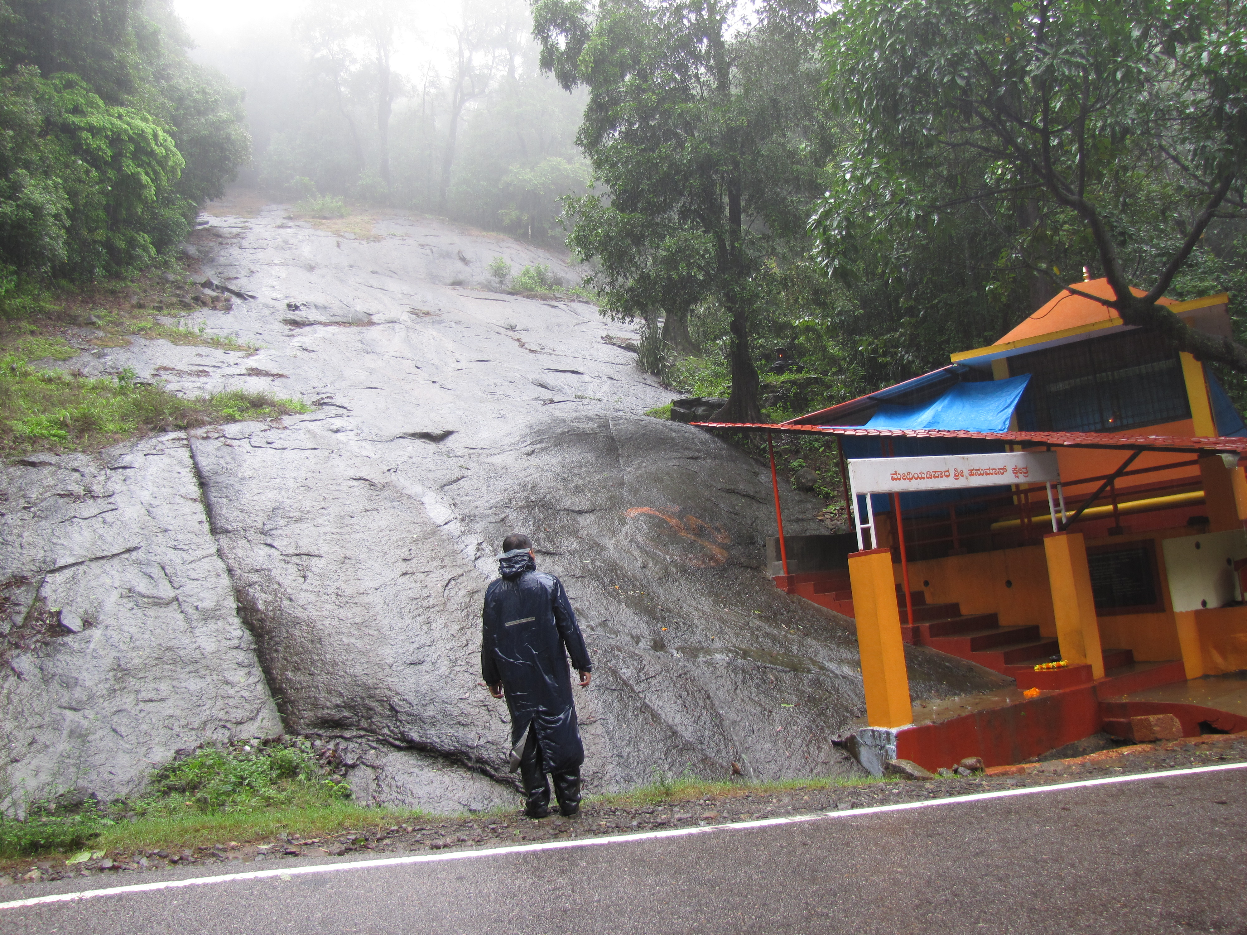 Methiyadippara Hanuman Temple , Perumbadi